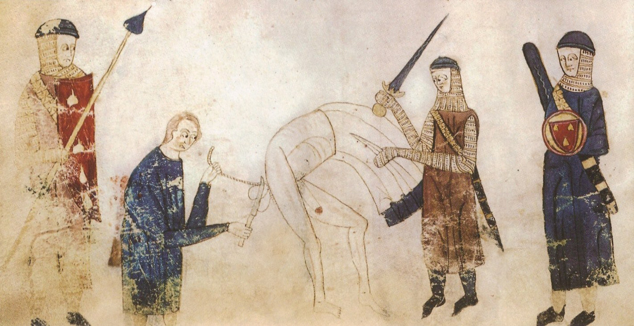 Castration, BNF Latin 9187 Coutumes de Toulouse, 1296 France Celui qui s'est rendu coupable d'homosexualité ou de bestialité, dans le meilleur des cas est transformé en eunuque par l'ablation de ses testicules.